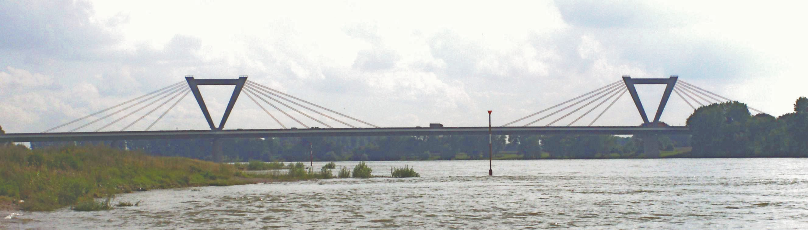 Flughafenbrücke in Düsseldorf. Von Norden, rechtes Rheinufer